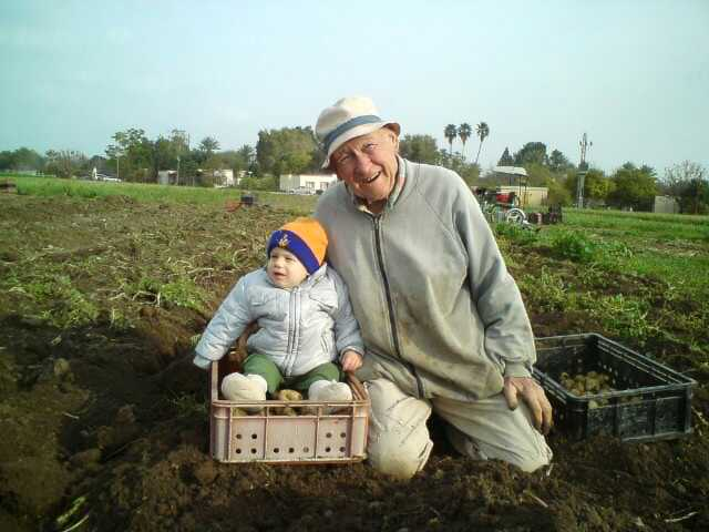 מריו לוי בשדה האורגני אשר בקיבוץ שדה אליהו, יחד עם נינו.